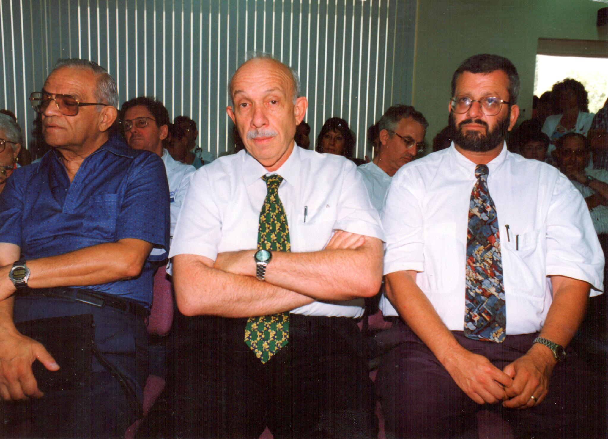 אביגדור קפלן (באמצע) יחד עם פרופ' יצחק פטרבורג (מימין) ופרופ' משה גרון ז"ל.